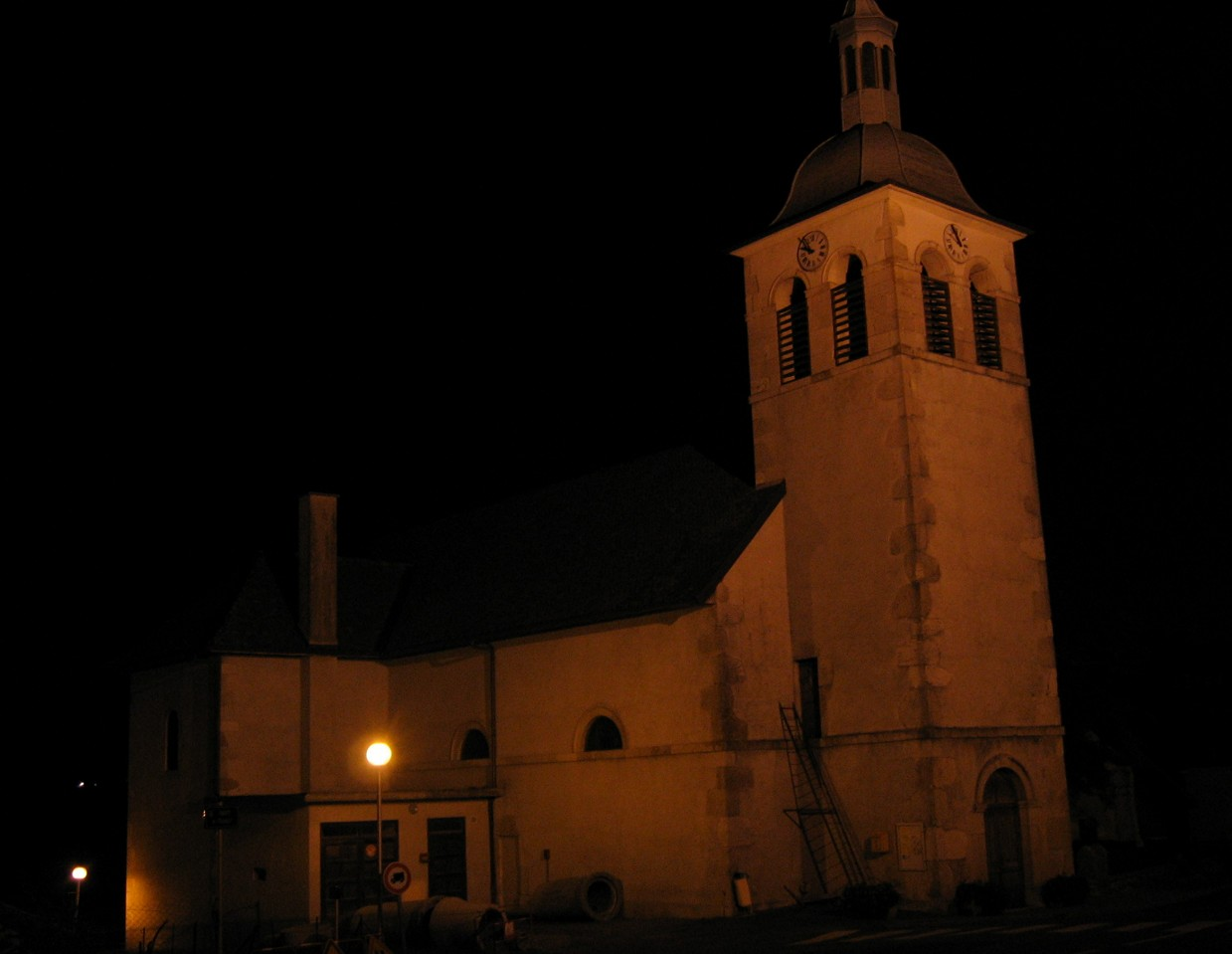 Allonzier-la-Caille, Kirche St. Martin.